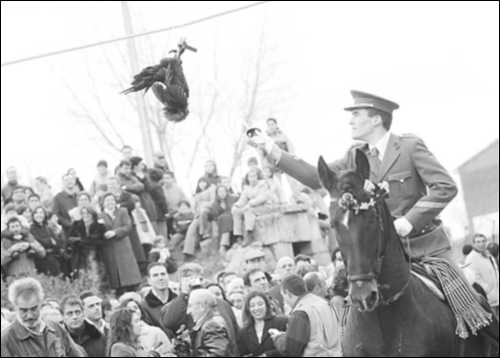 Correr el Gallo en Guarrete (Zamora, Castilla y León).